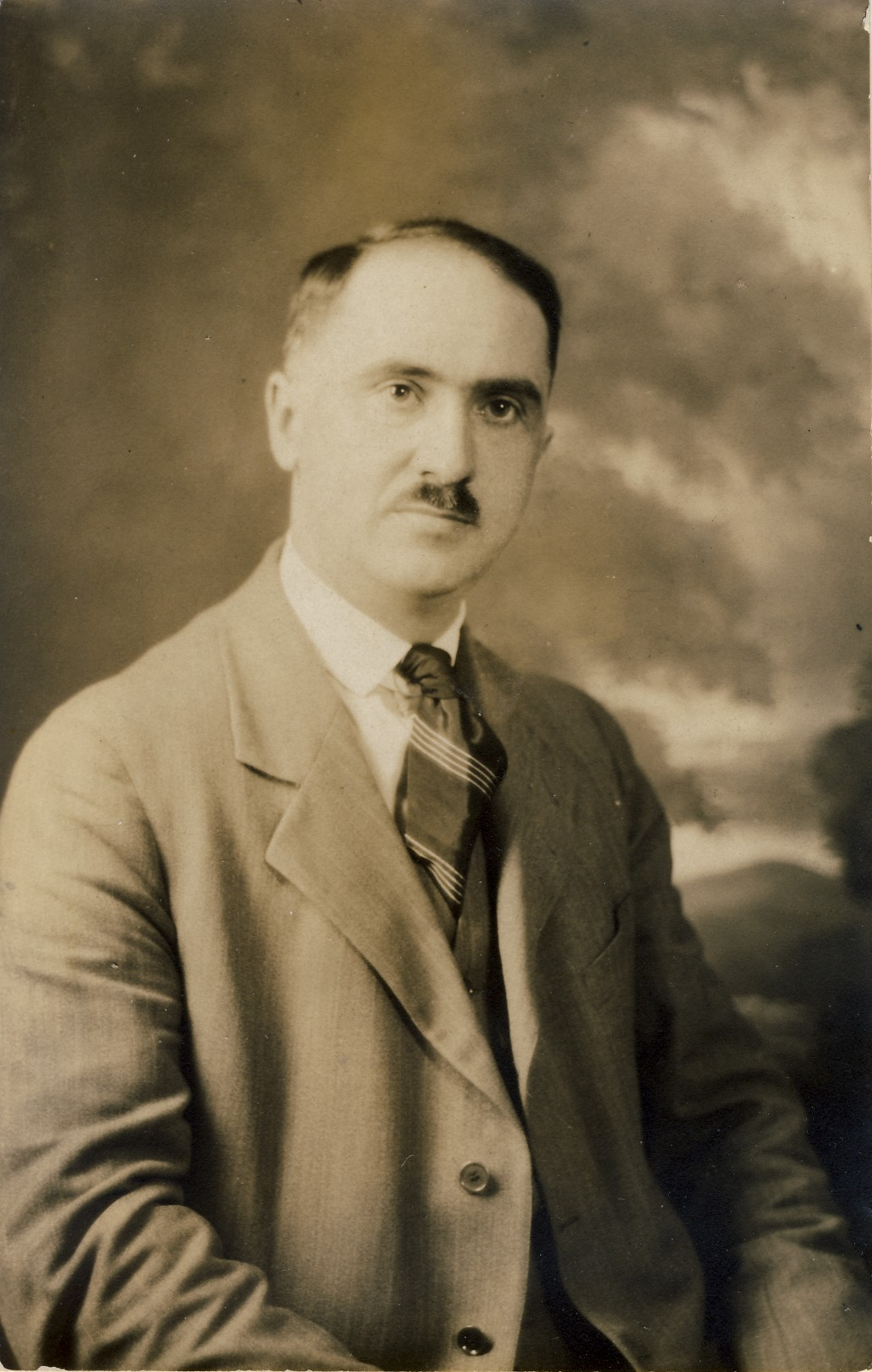 J. Armand Foucher vers 1930